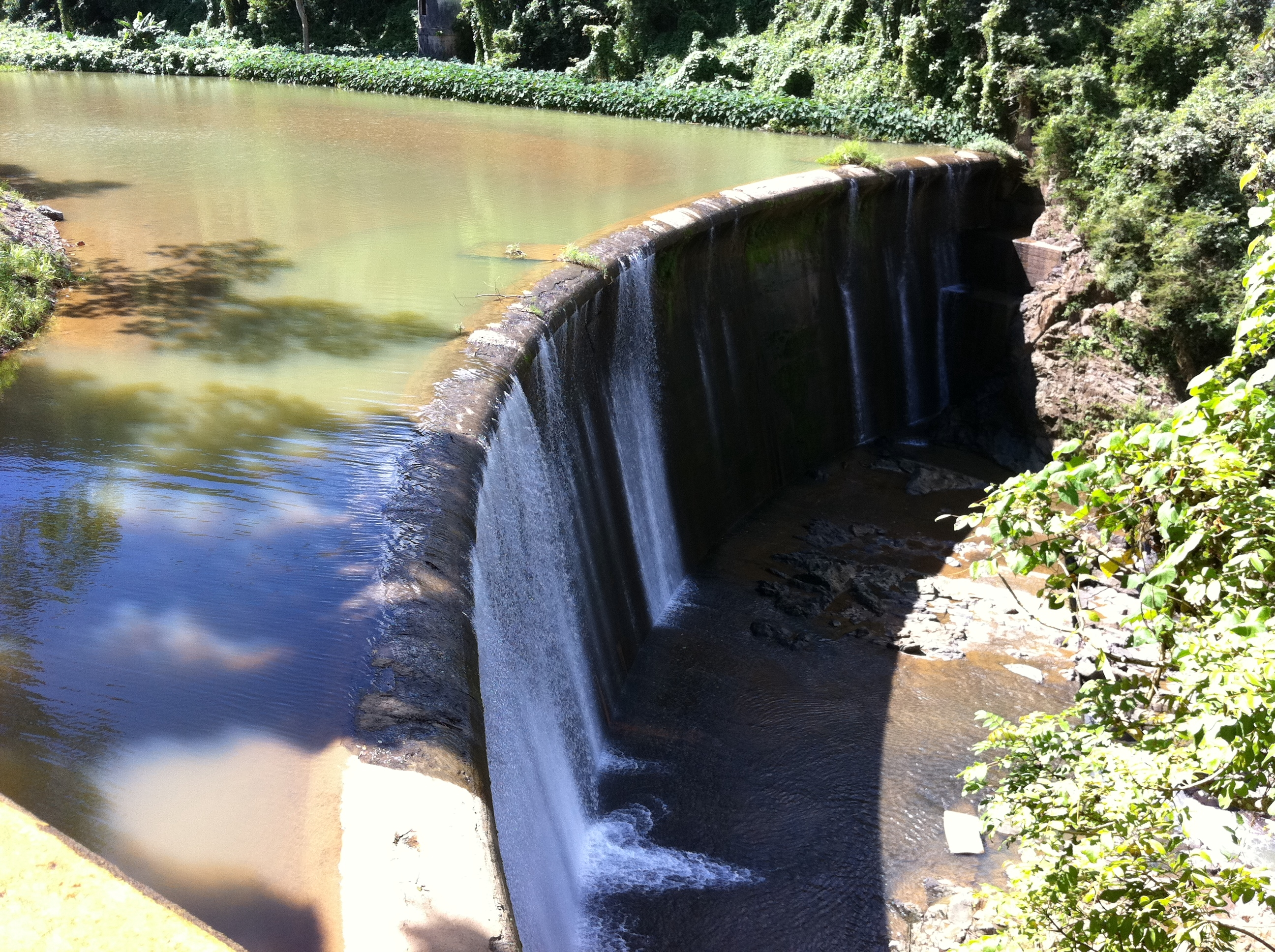 Represa de Aguas Buenas